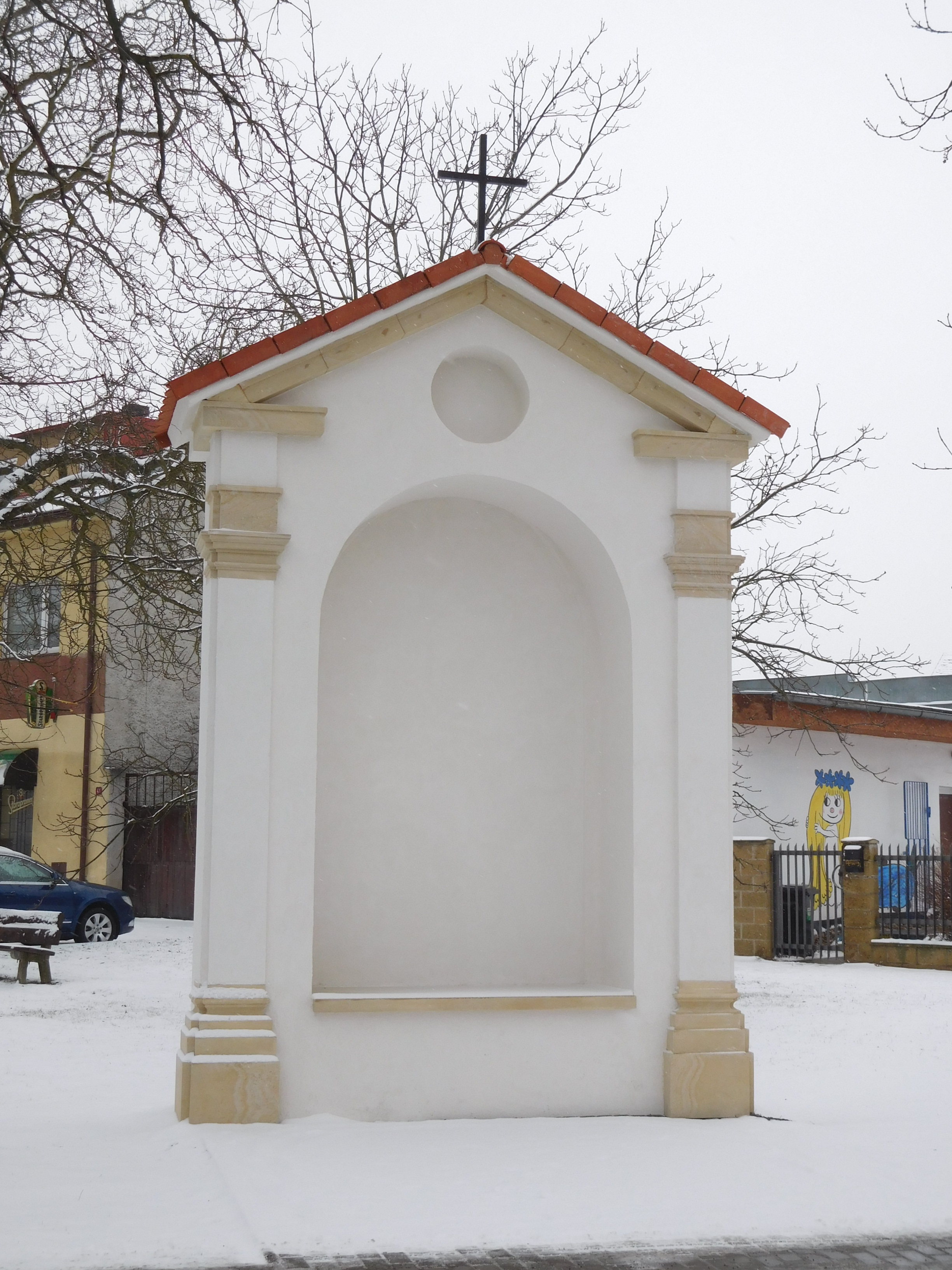 Praha - Kbely, Kutnohorská kaple (replika z roku 2018)